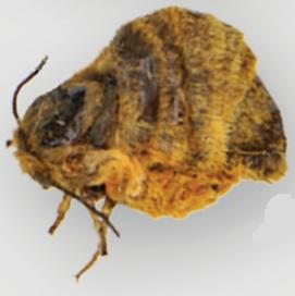 Andesobia sanguinea (2d) adults.